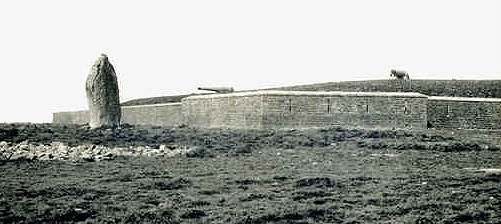 Ploemeur : le Fort du Talud vers 1920 (carte postale)